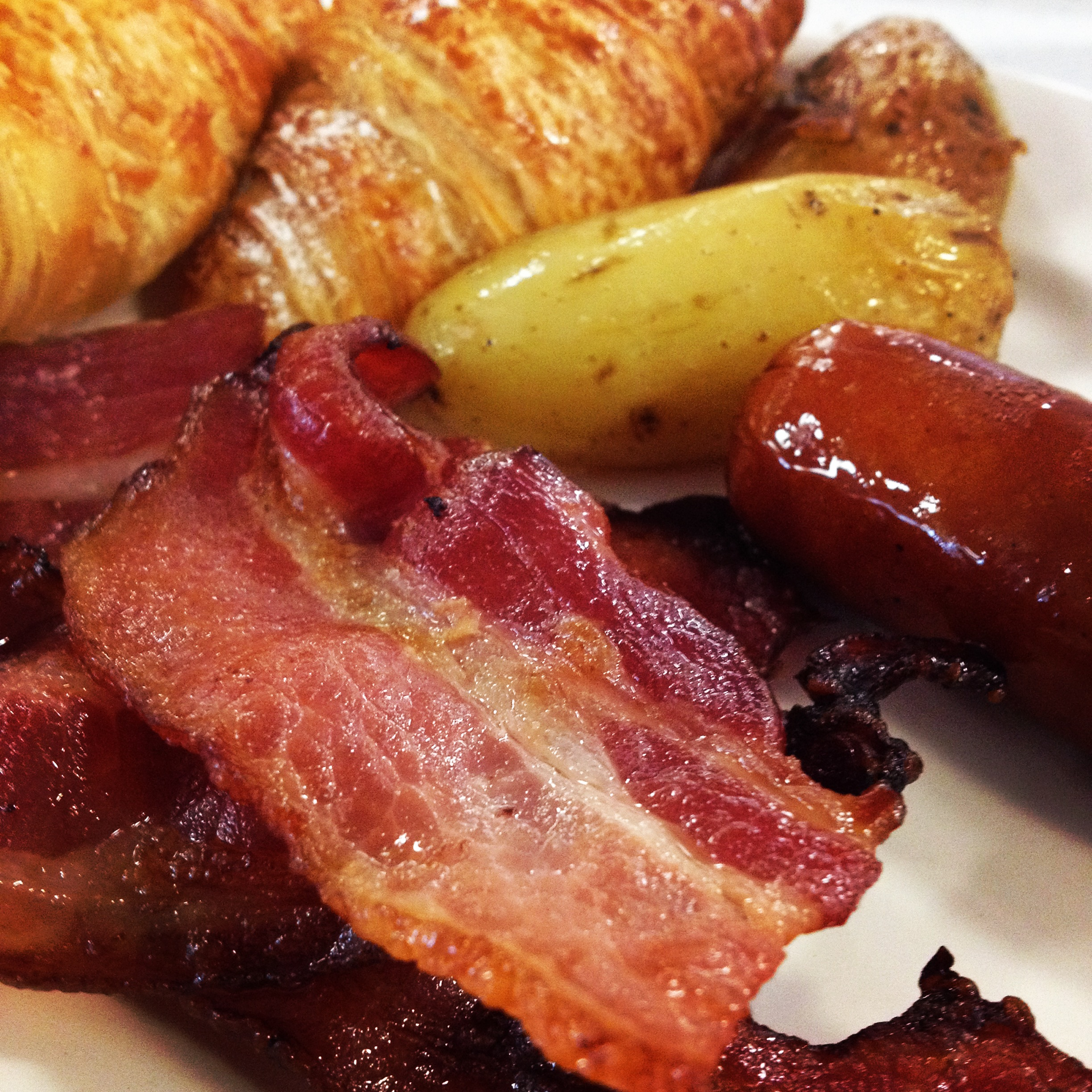 Bacon og annet.